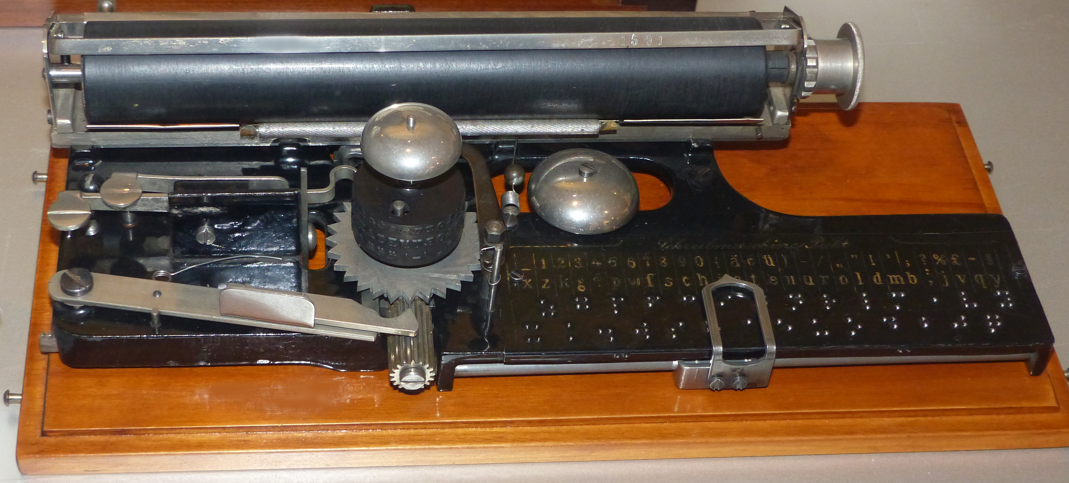 Blindenschreibmaschine Herde & Wendt, Berlin, um 1912; Exponat im Technischen Museum Wien